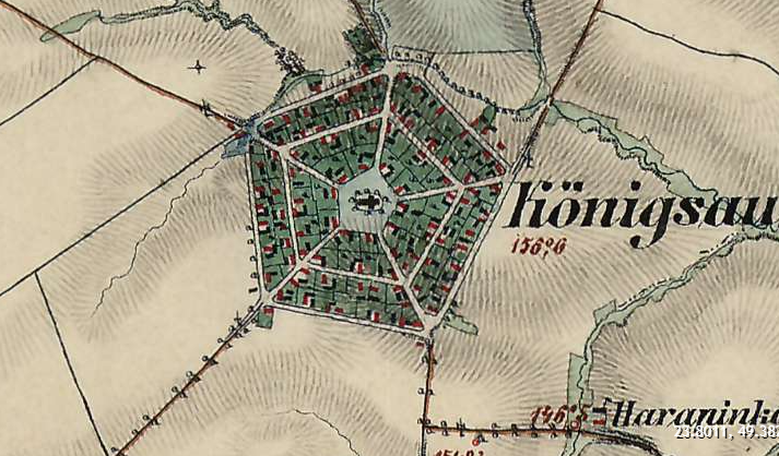 rivn drogobych